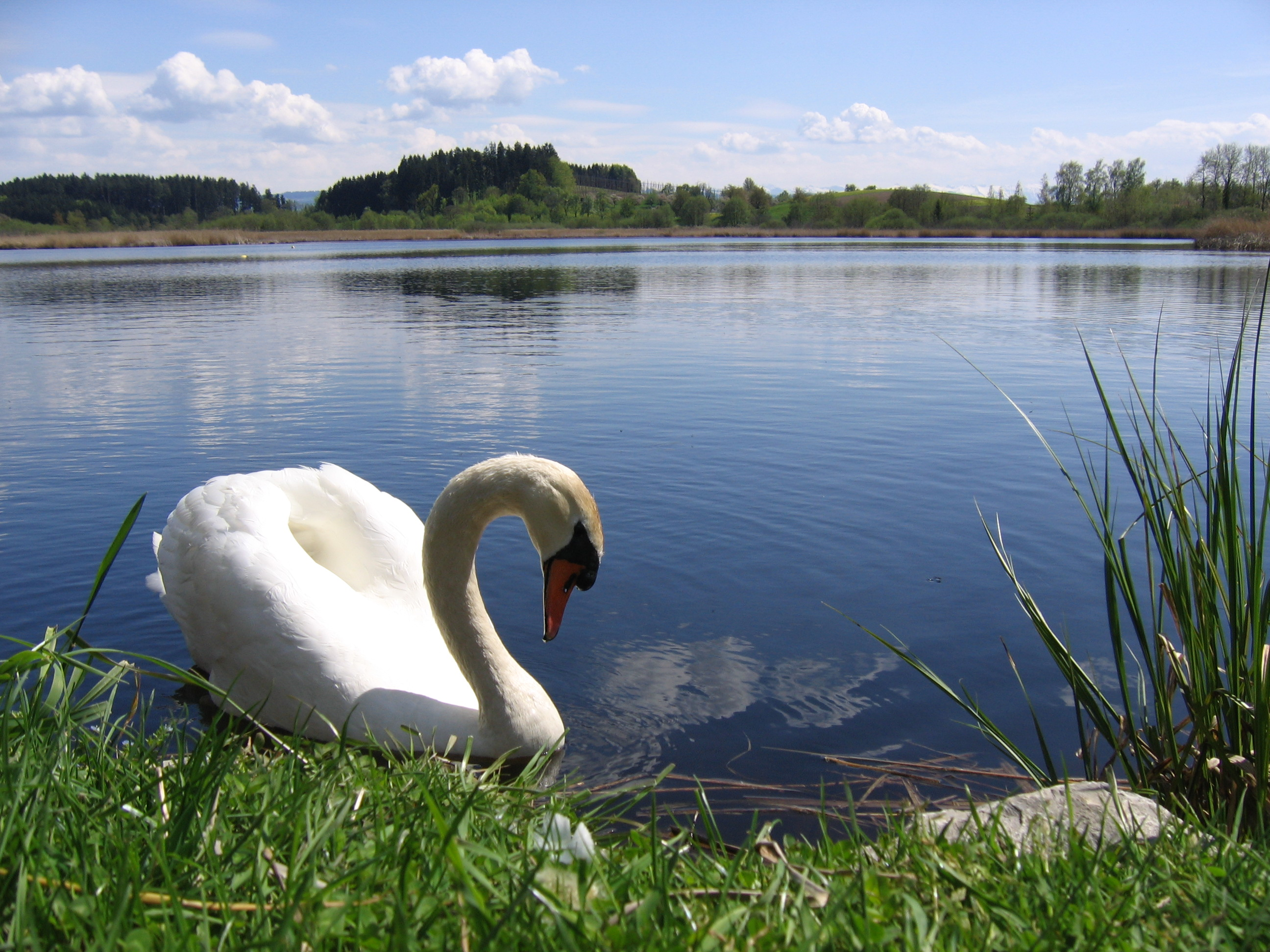 Deutschland - Baden-Württemberg - Bodenseekreis - Neukirch: Naturschutzgebiet Kreuzweiher-Langensee